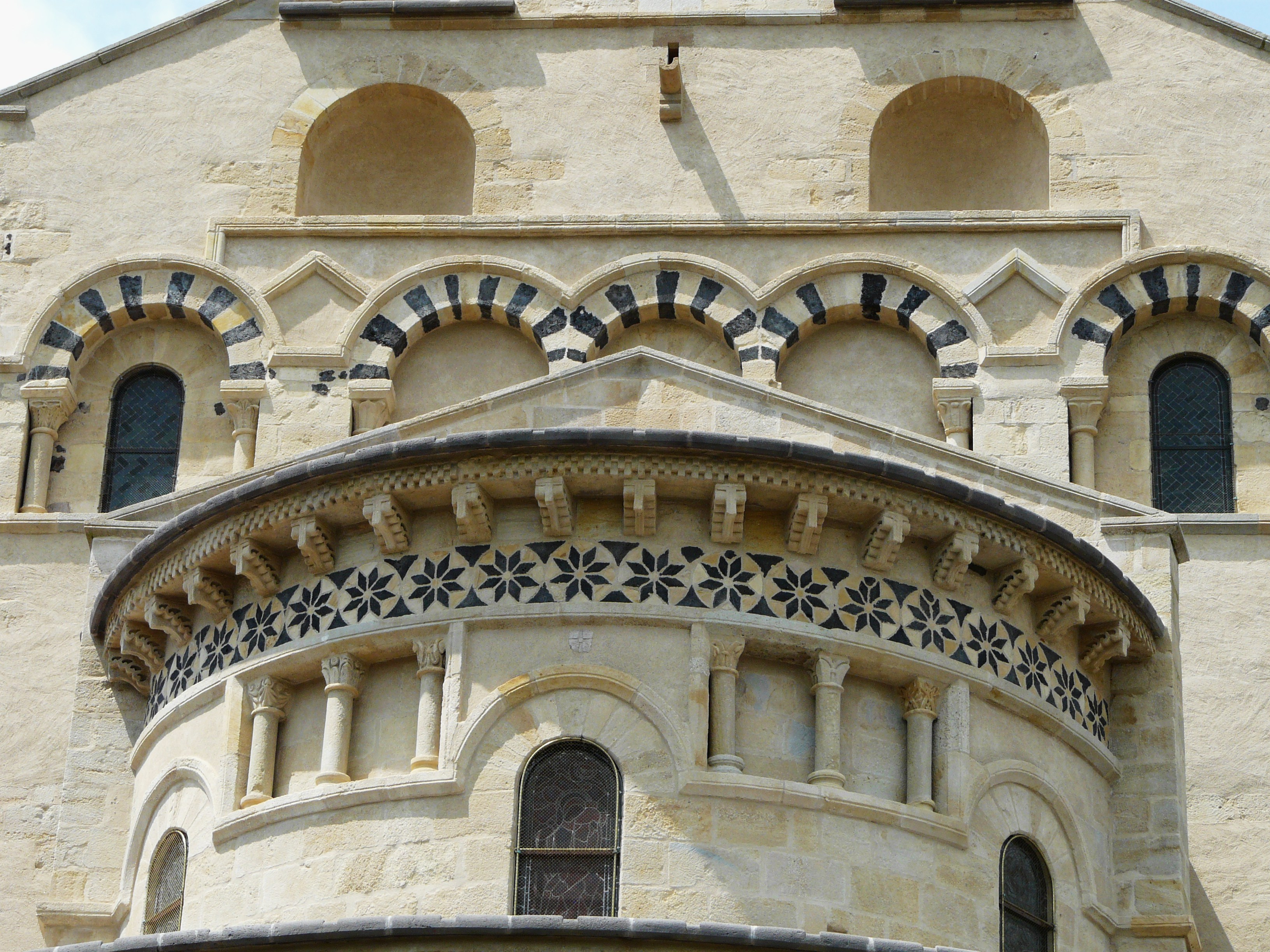 L'abside de l'église Notre-Dame de Saint-Saturnin, Puy-de-Dôme, France.